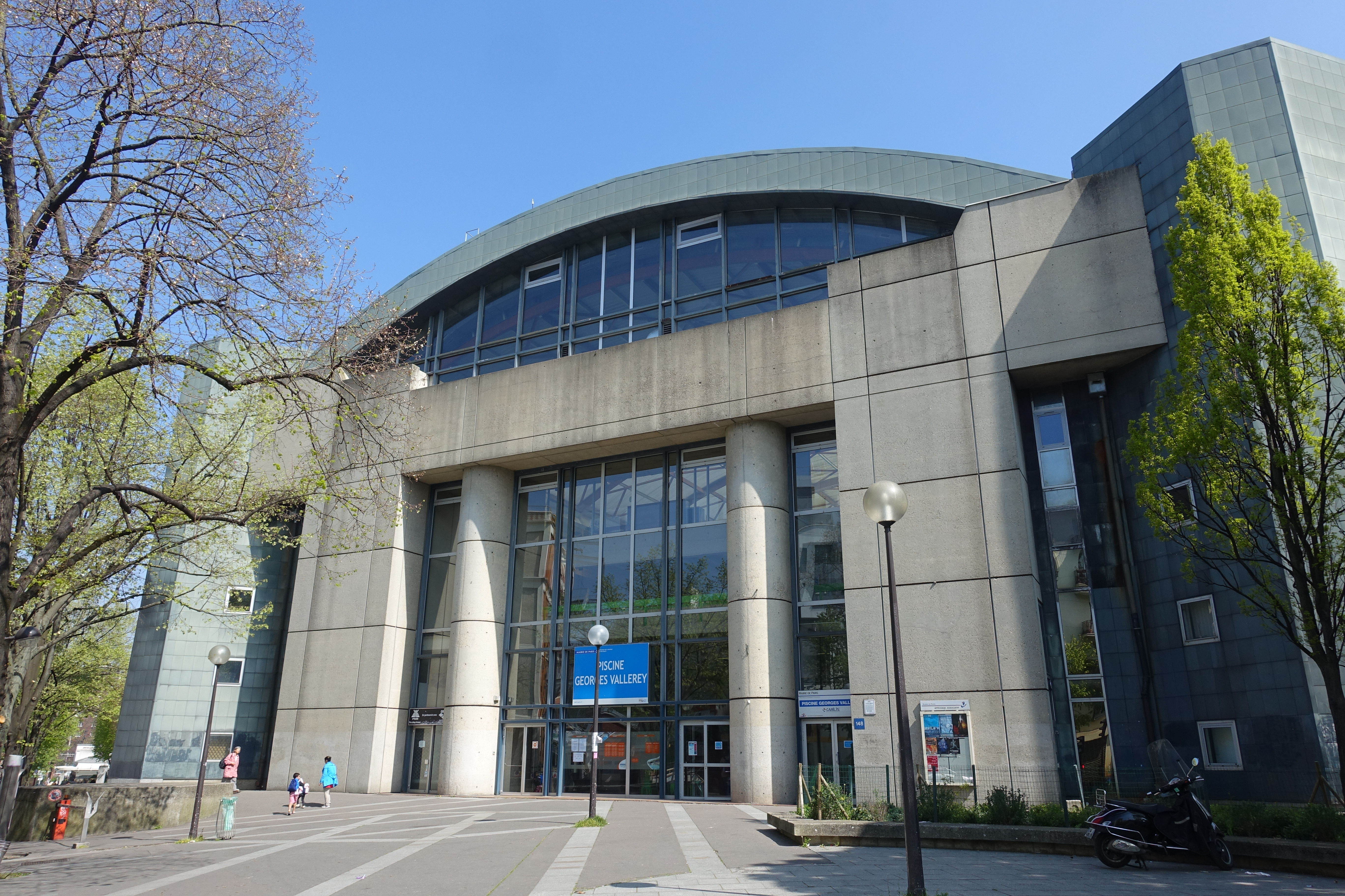 Piscine Georges Vallerey @ Paris